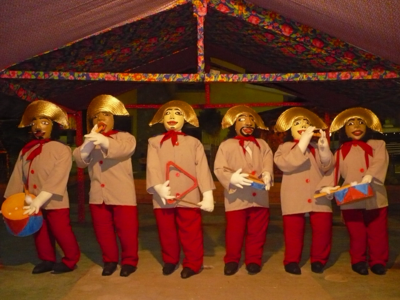 Bonecos vestidos como Banda de Pífano